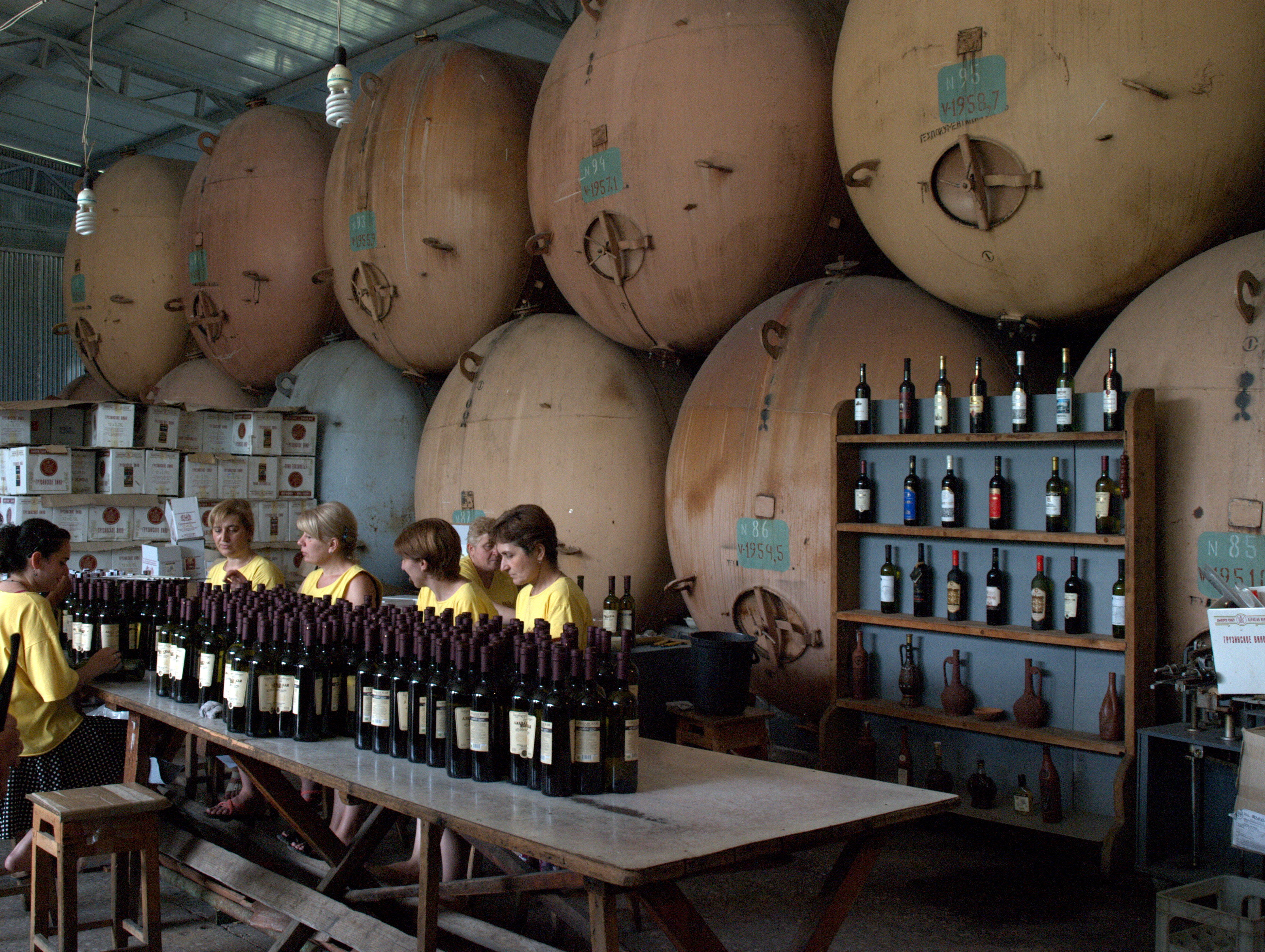 Georgia, Kvareli - wine factory